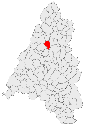 Categorie:Hărţi ale judeţului Bihor